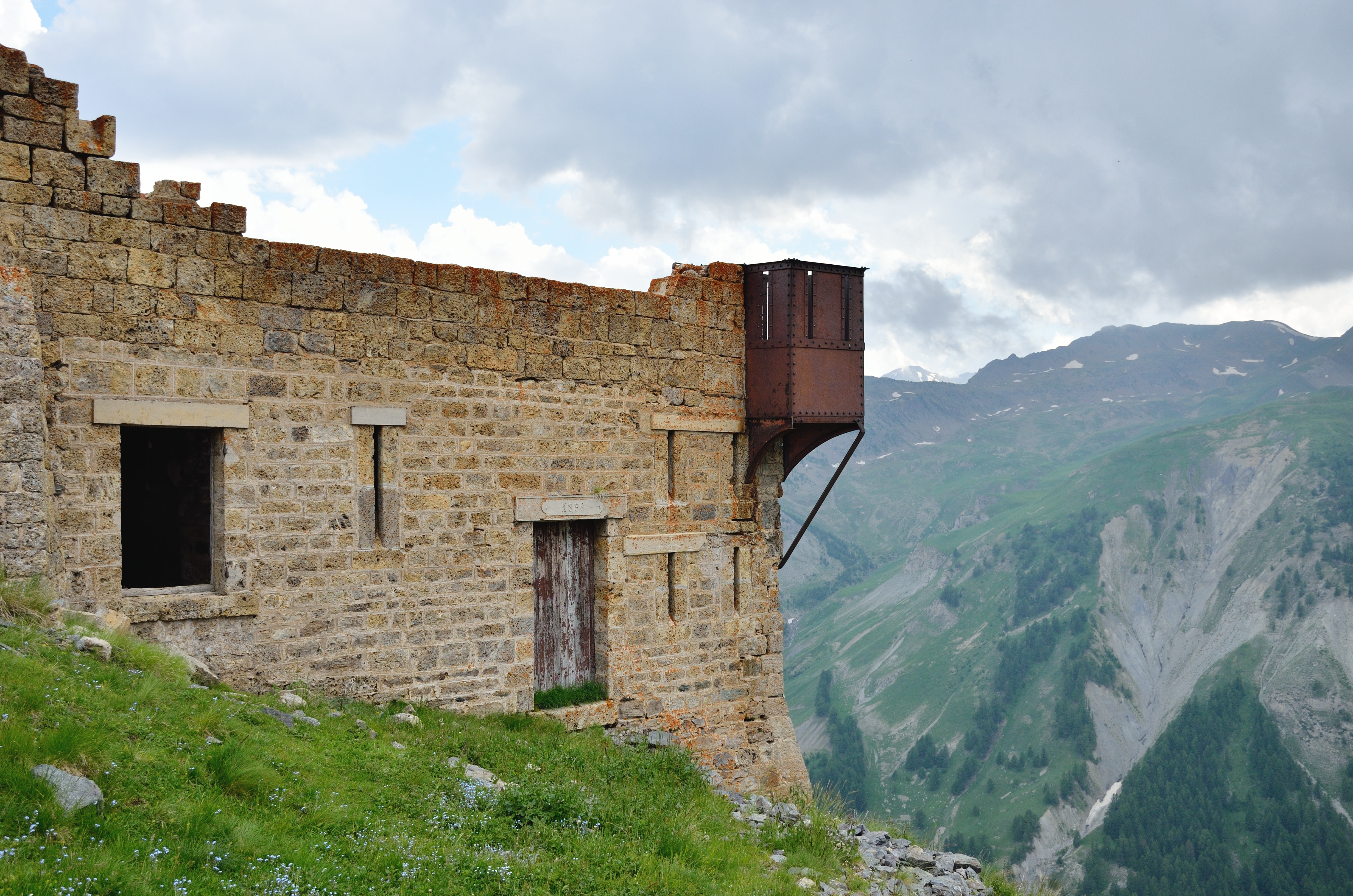 La position du Mont-des-Fourches et son échauguette, sur la commune de Saint-Dalmas-le-Selvage (Alpes-Maritimes)